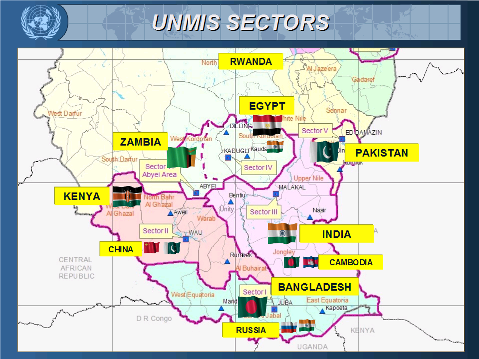 Sectors of UNMIS